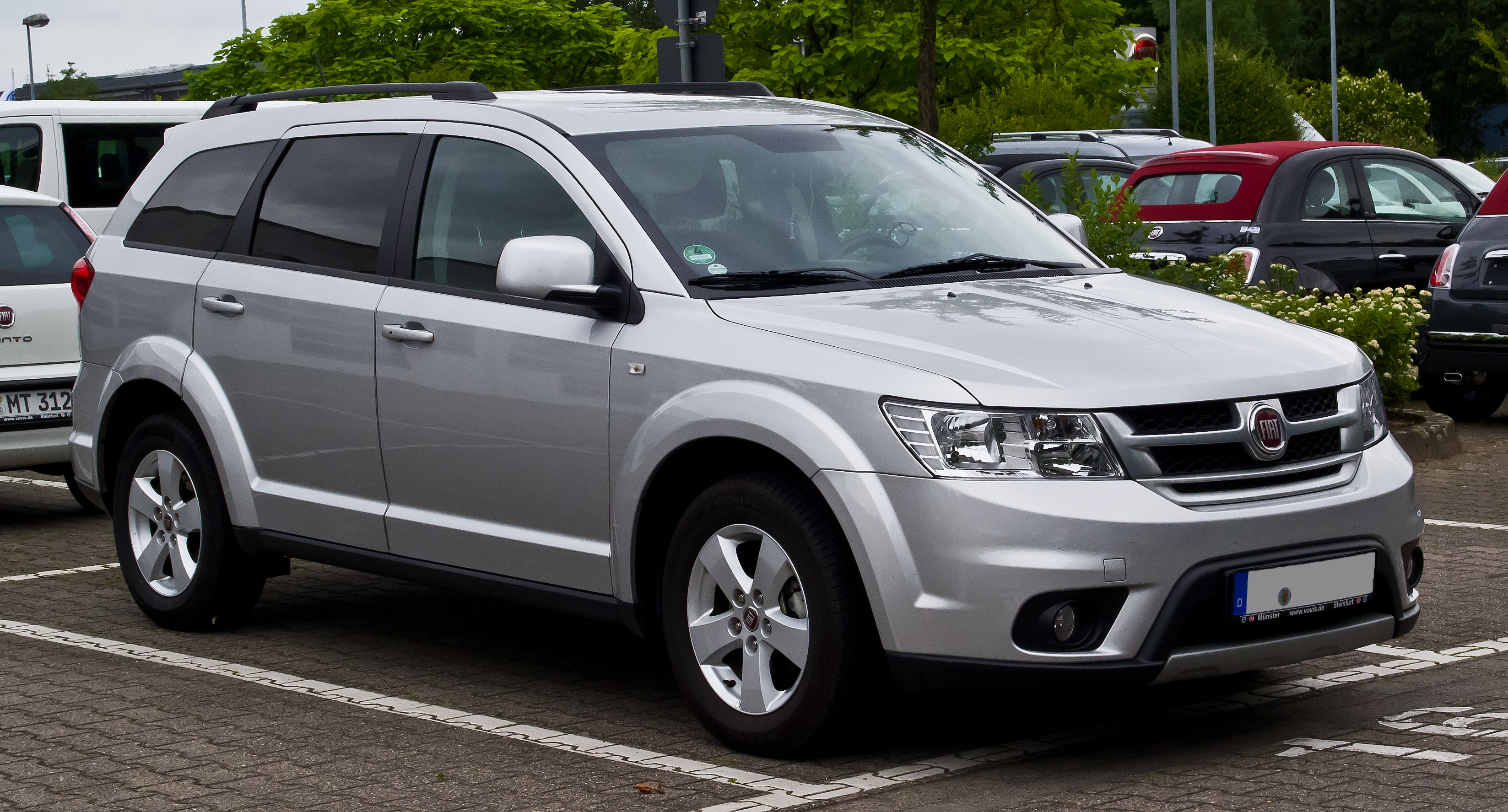 Fiat Freemont 2.0 16V Multijet